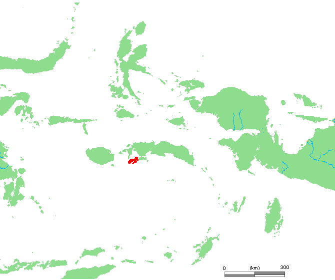 ID Ambon.PNG